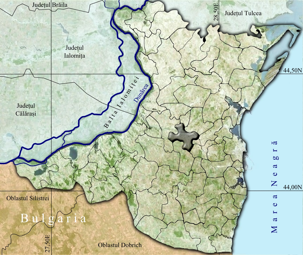 Medgidia jud Constanta.jpg